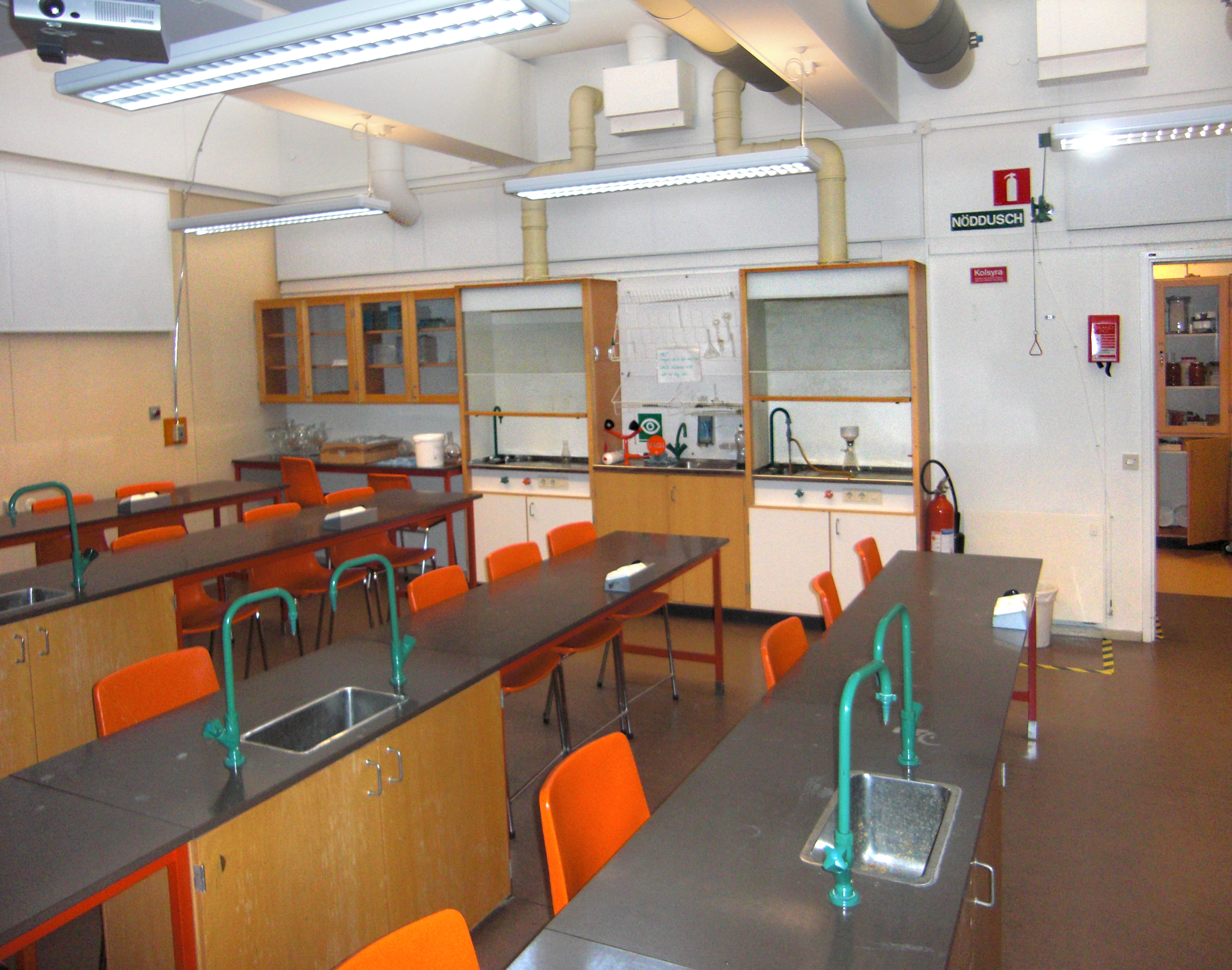 Kemisal (Sal A307) i Naturvetenskapliga institutionen i gamla A-huset på Ållebergsgymnasiet, Falköping, Falköpings kommun, f.d. Skaraborgs län, Västergötland, Västra Götalands län, Sverige. A-huset byggdes 1974 och revs 2013. Lägg märke till inredningen i orange från 1970-talet. Fotot är taget i samband med Falbygdens museums byggnadsdokumentation i 25 januari 2010. NV-institutionen var då den enda som fortfarande var i fullt bruk.